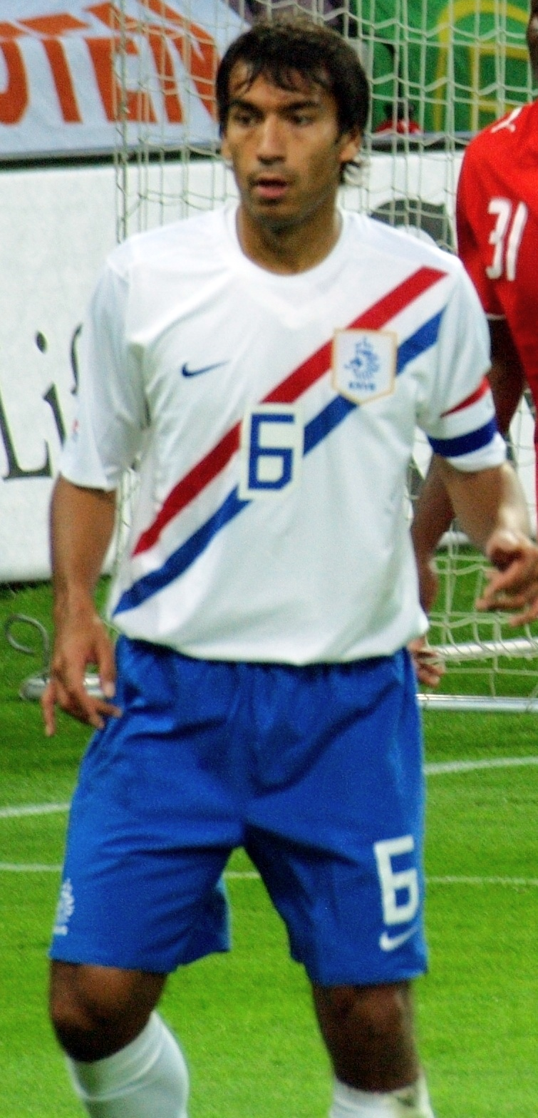 Giovanni van Bronckhorst (Nederland)